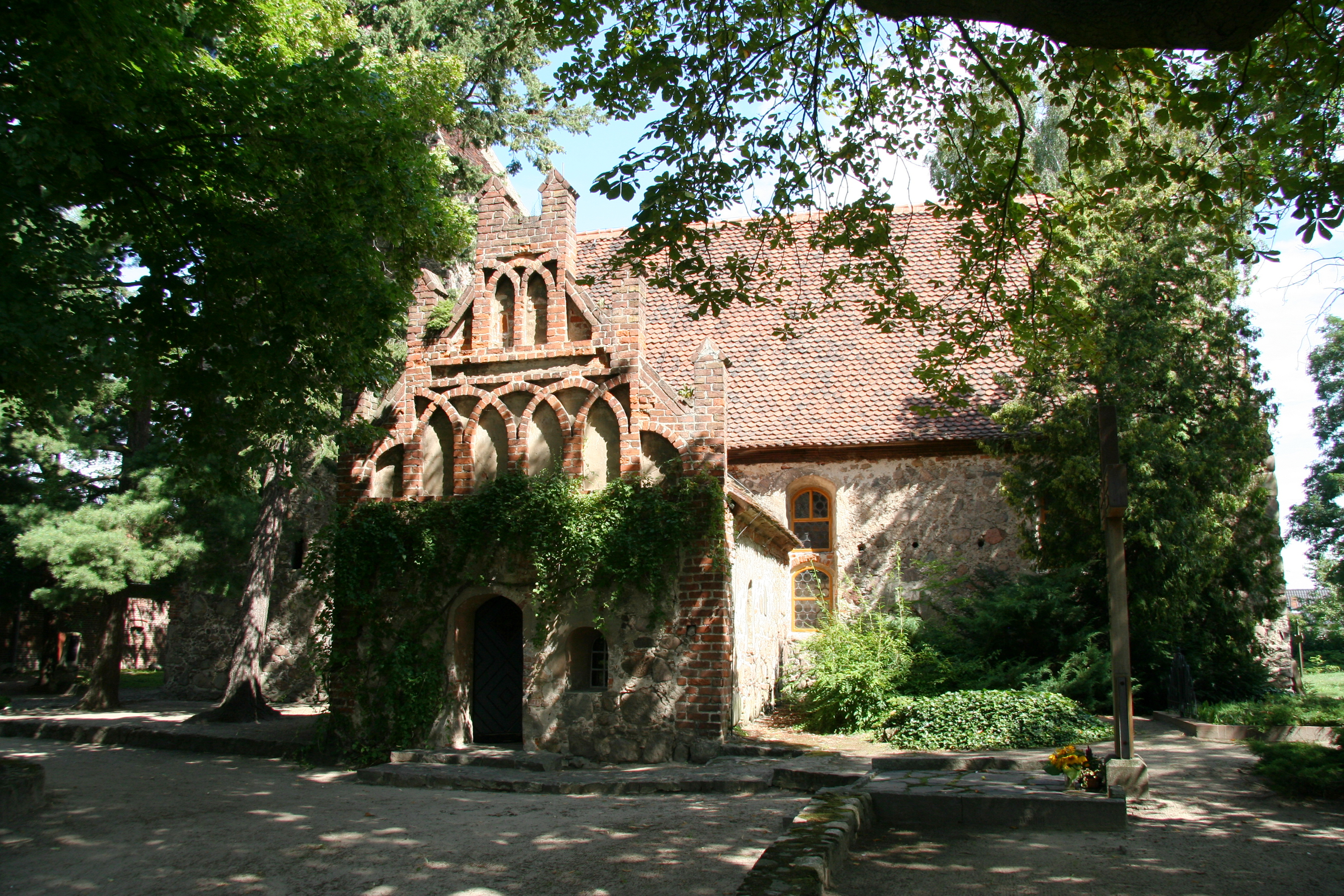 Dorfkirche in Zaue, Gemeinde Schwielochsee, Brandenburg